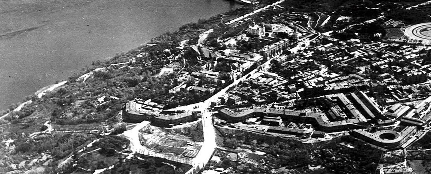 Арсенал, Микільська брама Нової Печерської фортеці, Військовий Микільський собор, район Хрестів. Печерськ. Київ